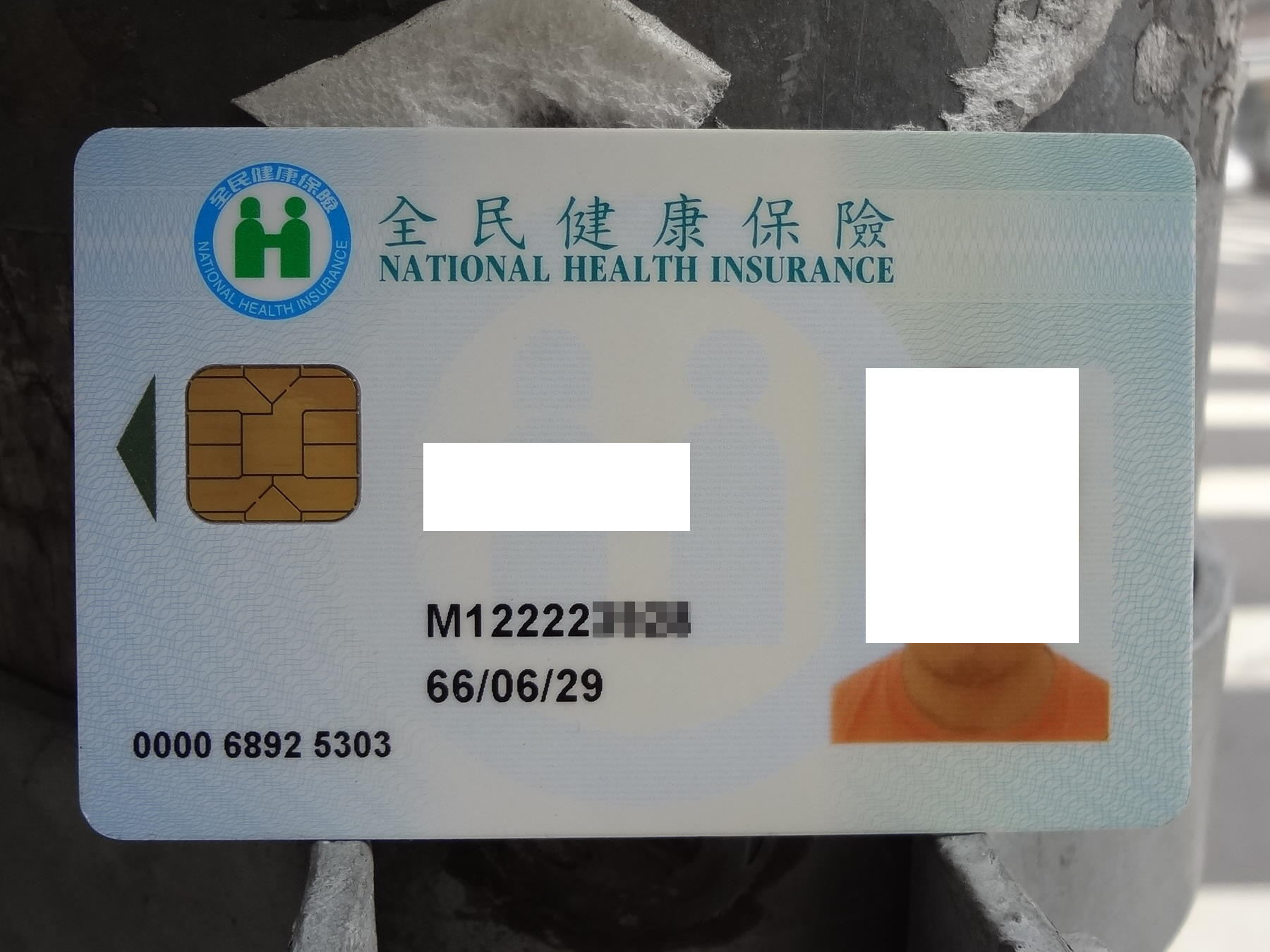 中華民國全民健康保險IC卡正面